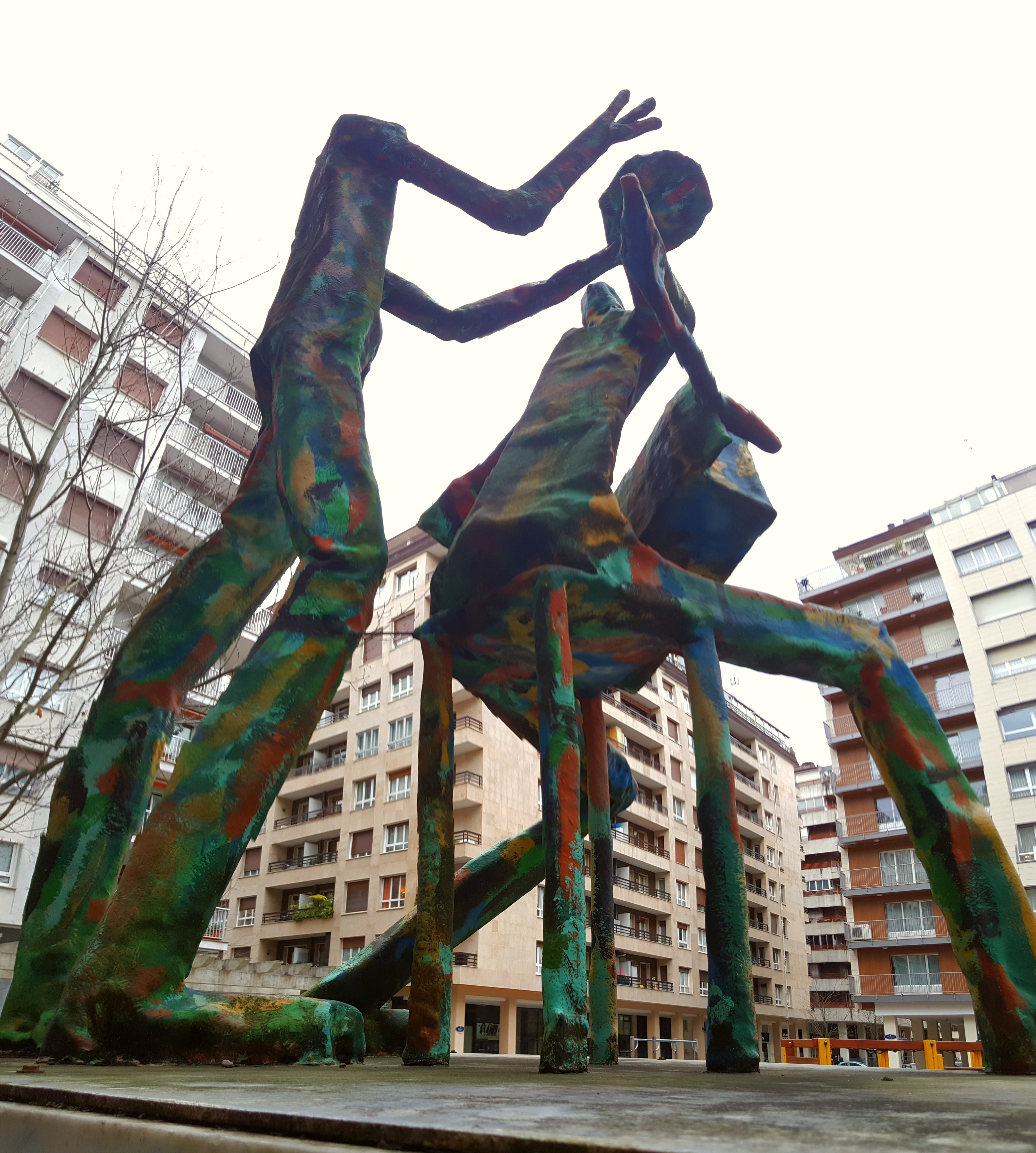 Donostian Amarako Etxeberri plazako eskultura